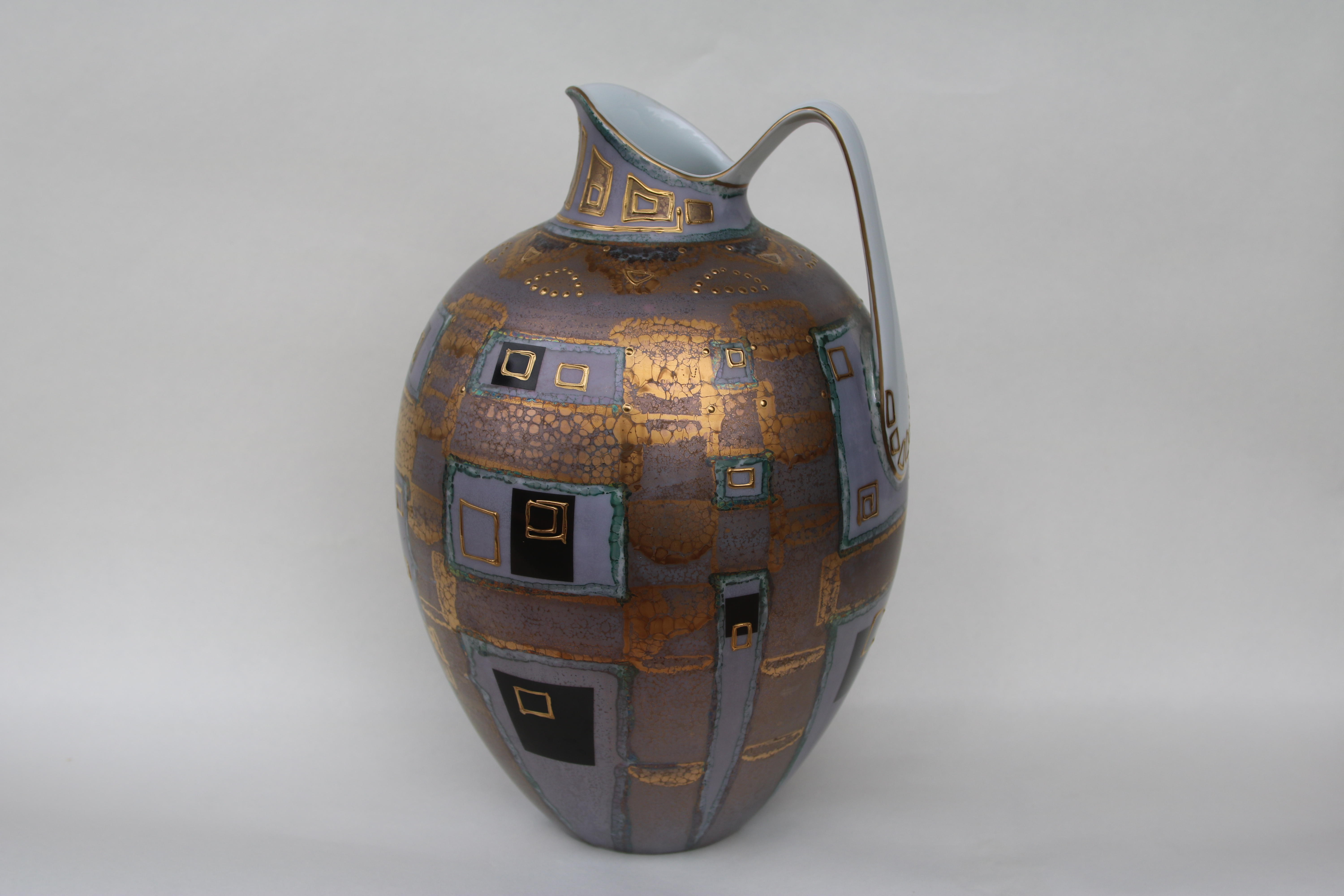 Kunstobjekte von Helmut Drexler